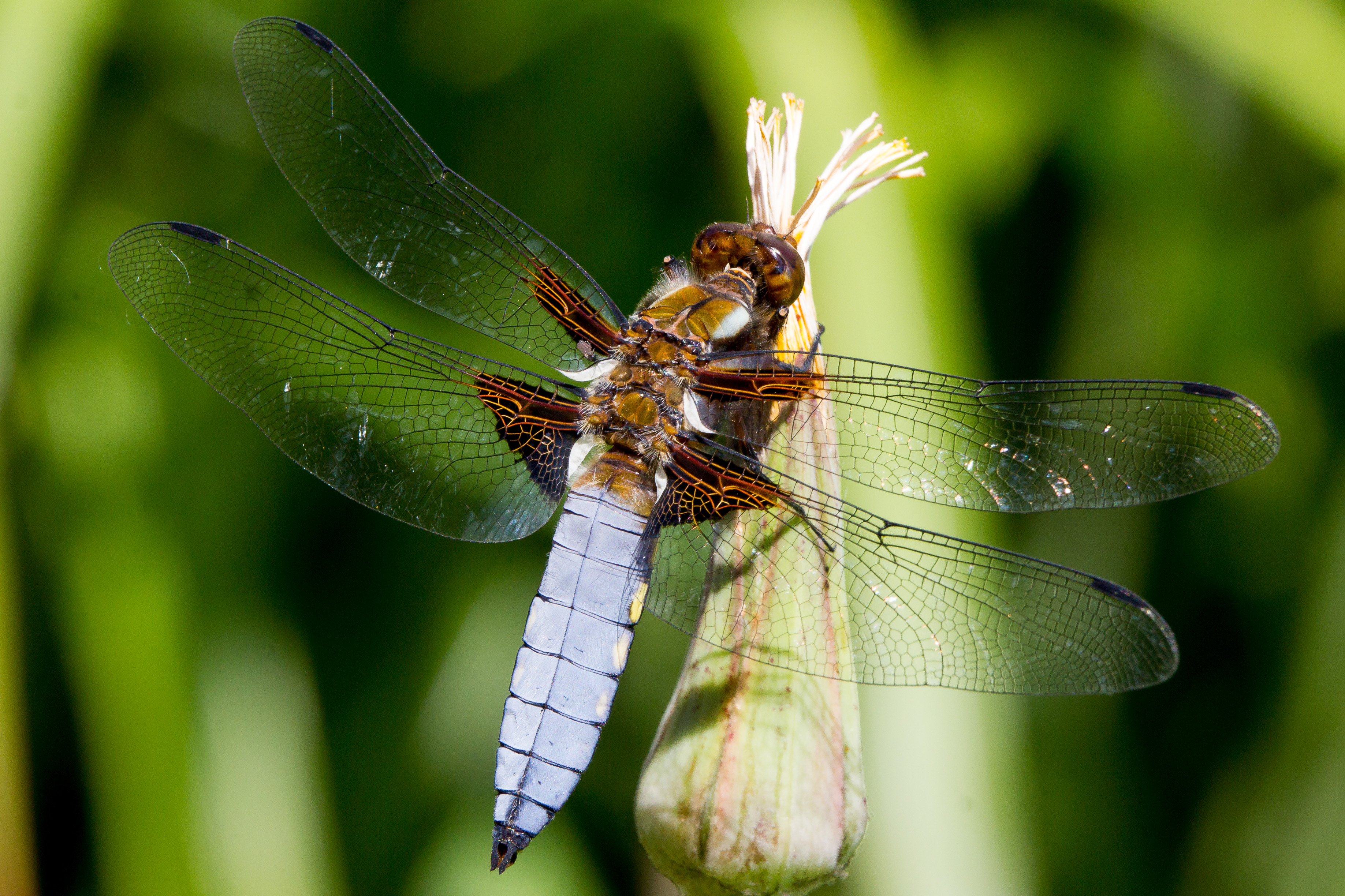 Laposhasú acsa hím egyede a szárnyán egy apró rovarral